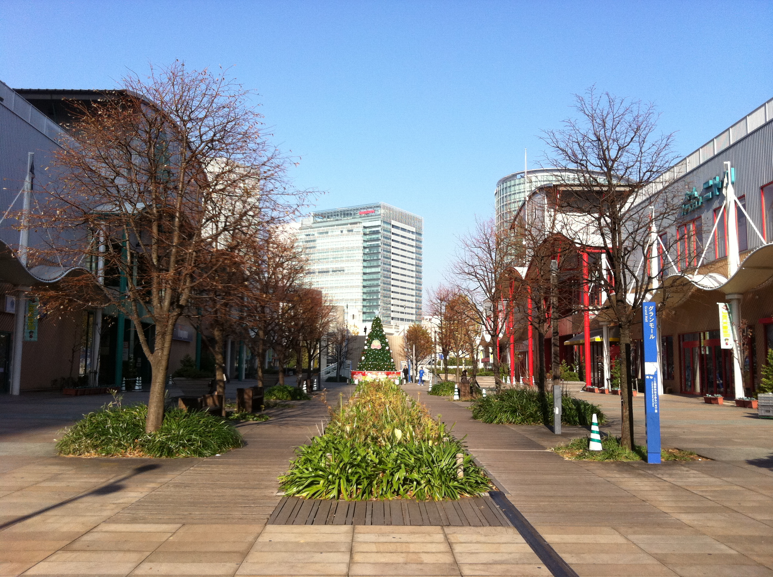 グランモール軸 在りし日の横浜ジャックモール（暫定施設）前。以前はグランドセントラルタワー前と同じく中心軸に沿って水が張られていたが、埋め立てられて花壇となった。